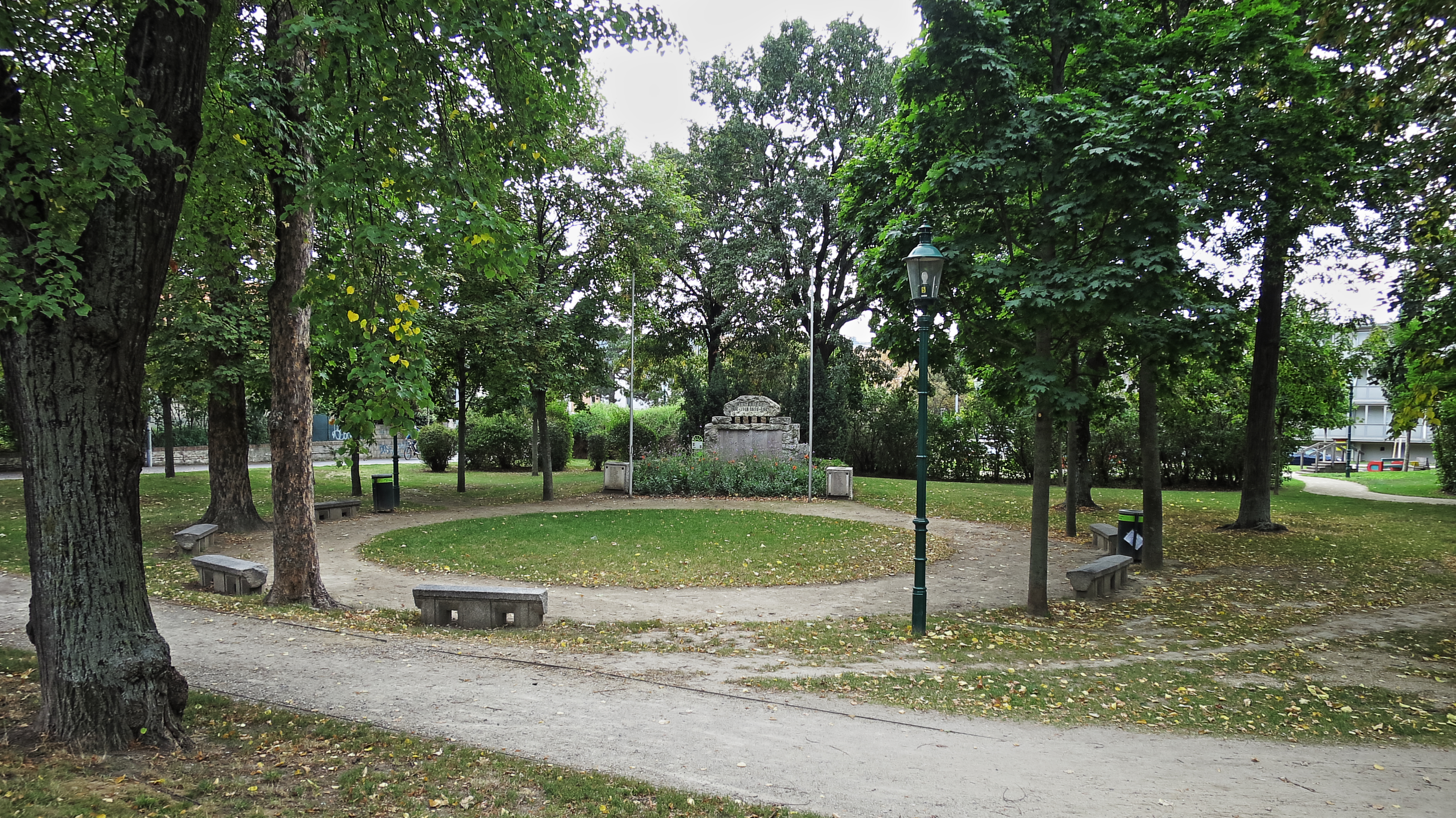 Jazzpark Essling in Wien-Donaustadt